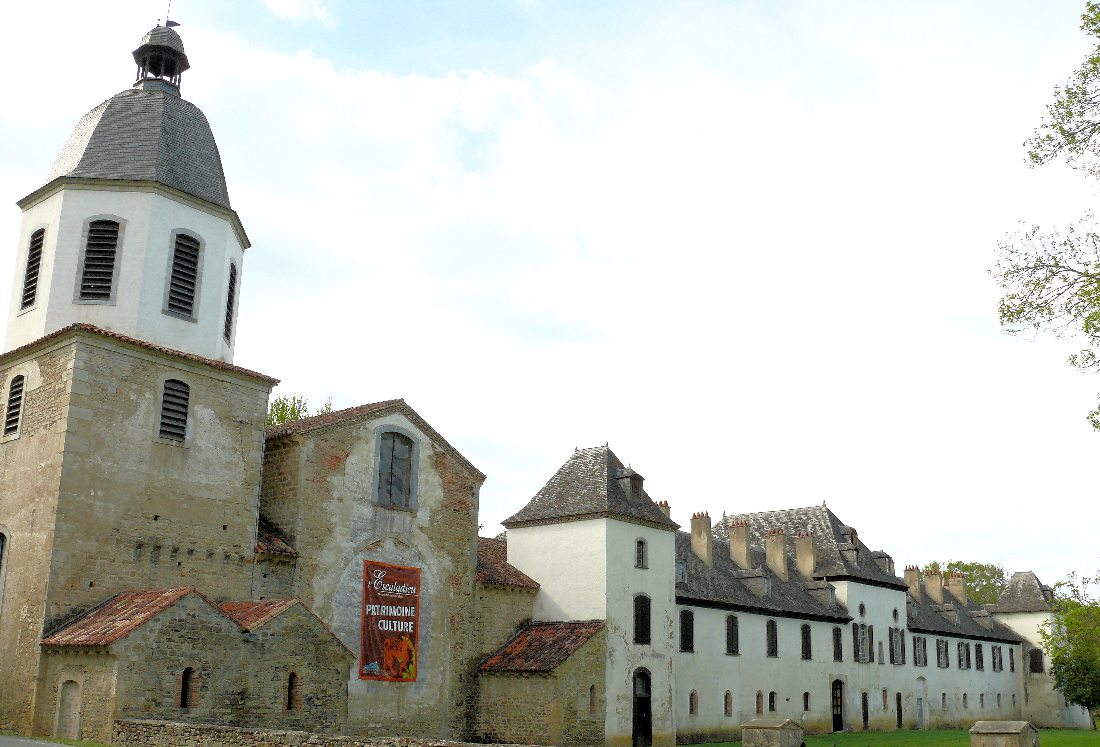 Hautes-Pyrénées - Abbaye de l'Escaladieu